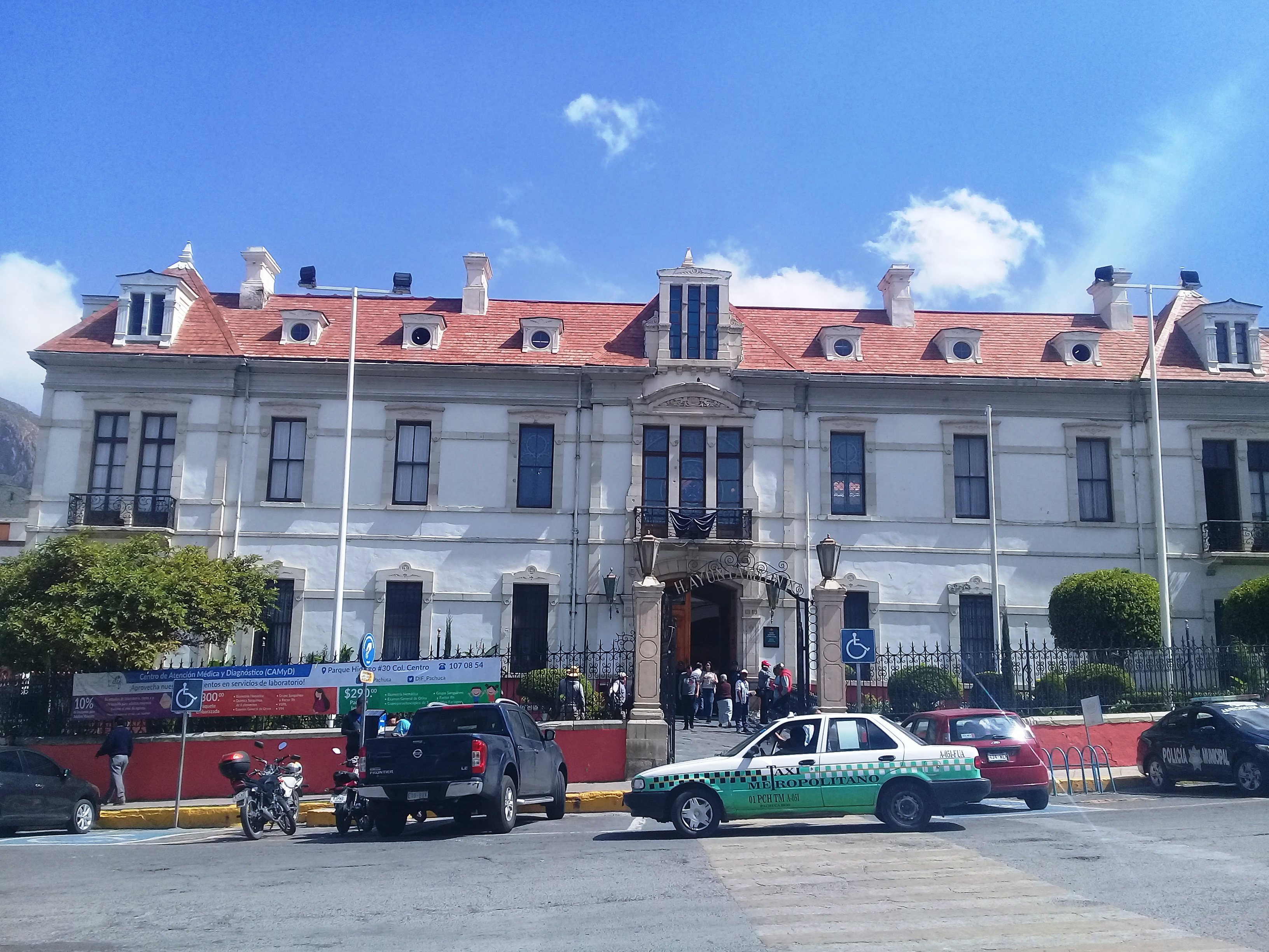 Palacio Municipal de Pachuca